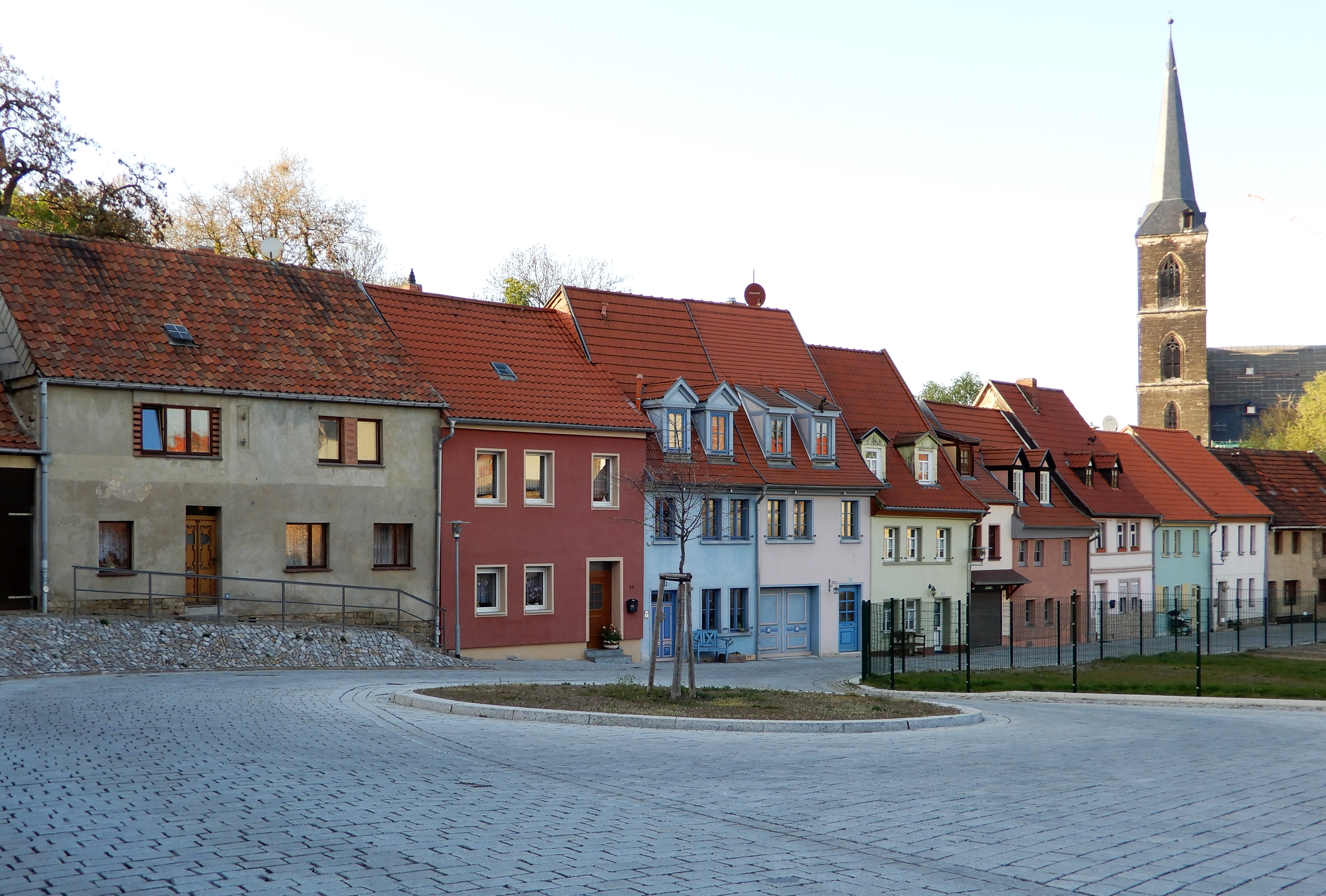 Gebäude Kiethof 2-12 in Aschersleben